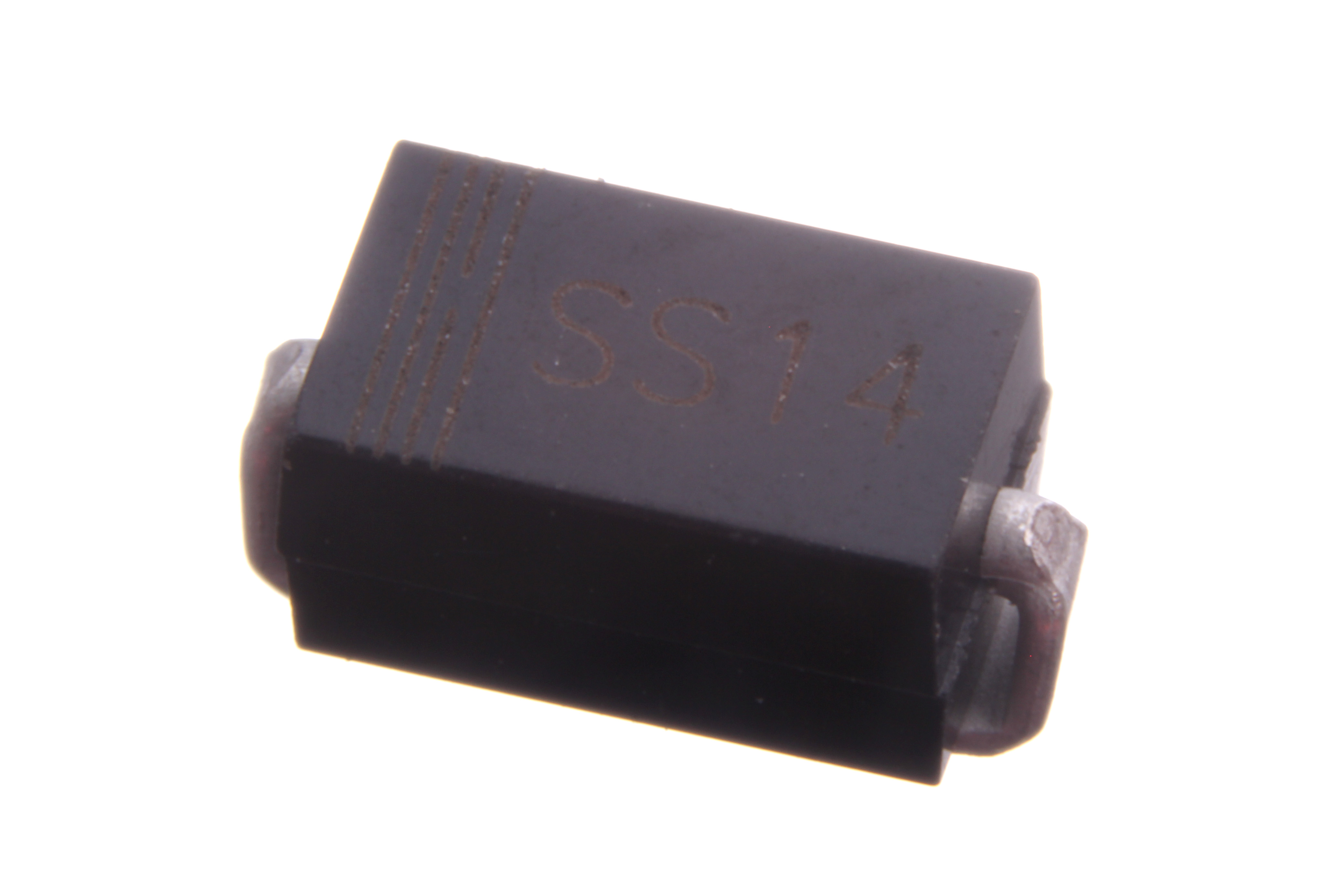 SS14 1A DO-214 Schottky diode.